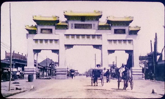 1909年，克林德碑